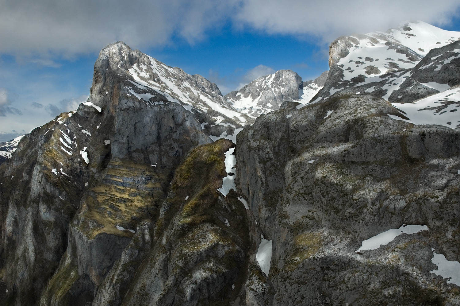 Peña Remoña y el Pico de la Padiorna, en el Macizo Central de los Picos de Europa (España).